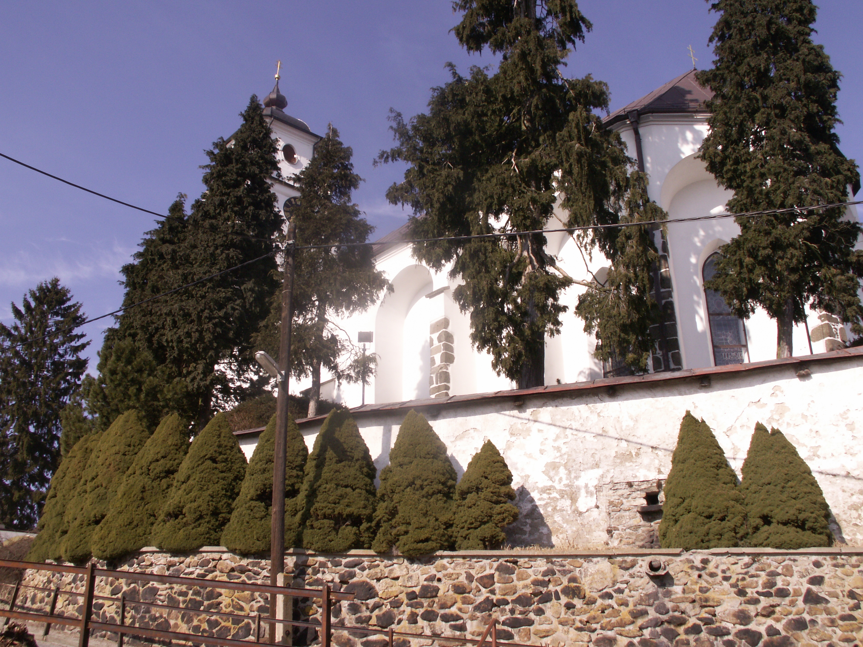 kostel Nanebevzetí P. Marie, Netín, okres Žďár nad Sázavou, kraj Vysočina